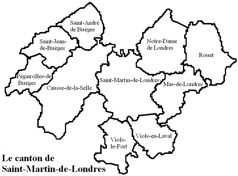 Le canton de Saint Martin de Londres Image personnelle